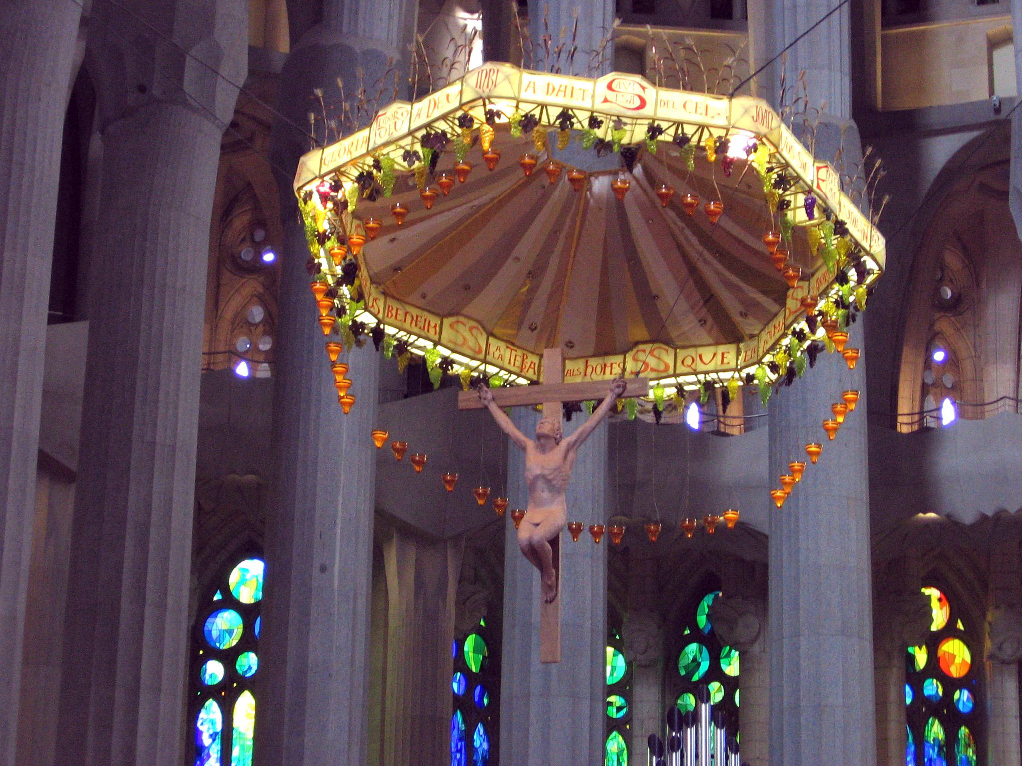 Baldaquino del altar central de la Sagrada Familia.